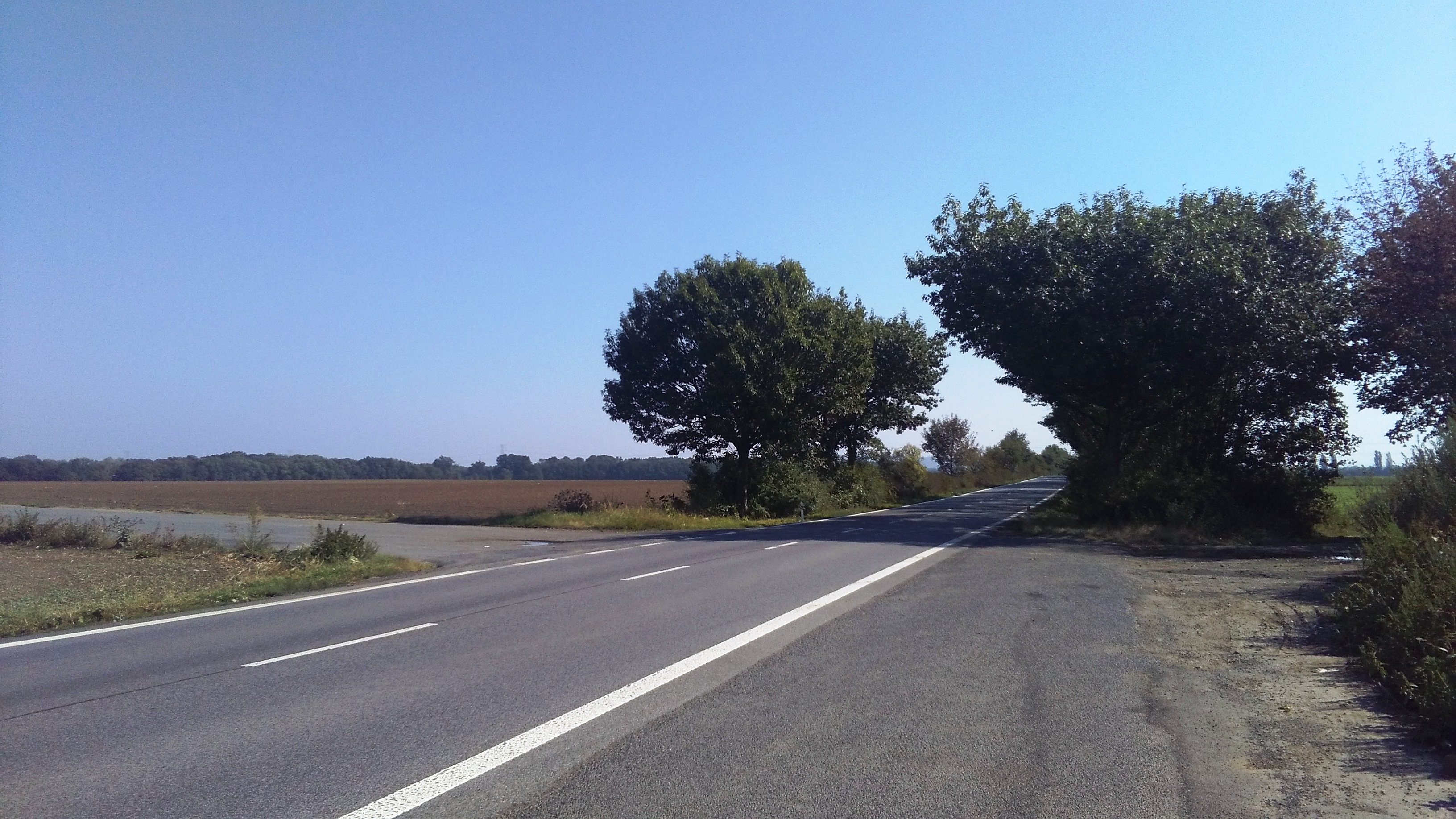 Silnice I/16 mezi Krnskem a Beznem, Středočeský kraj